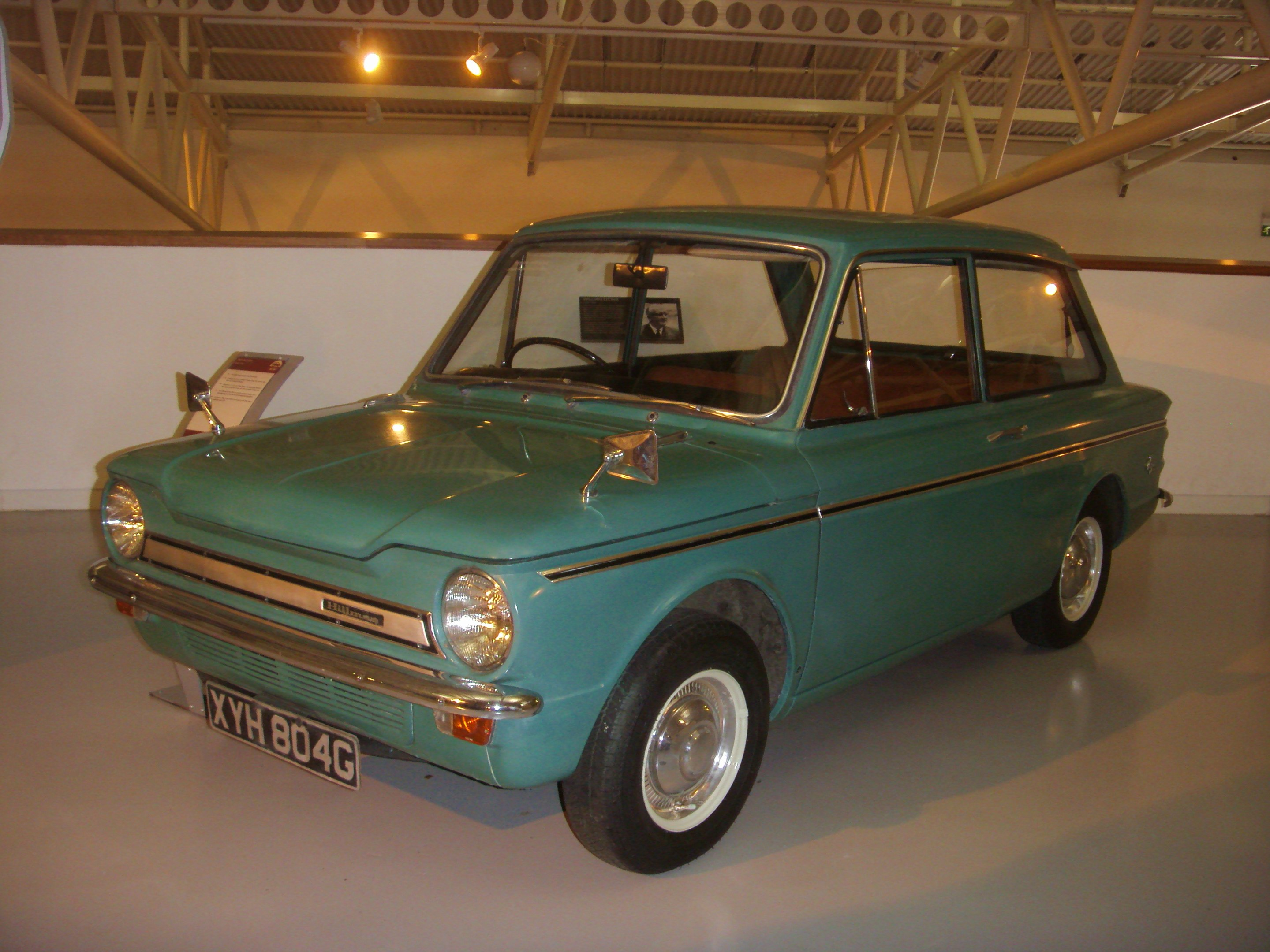 1969 Hillman Imp